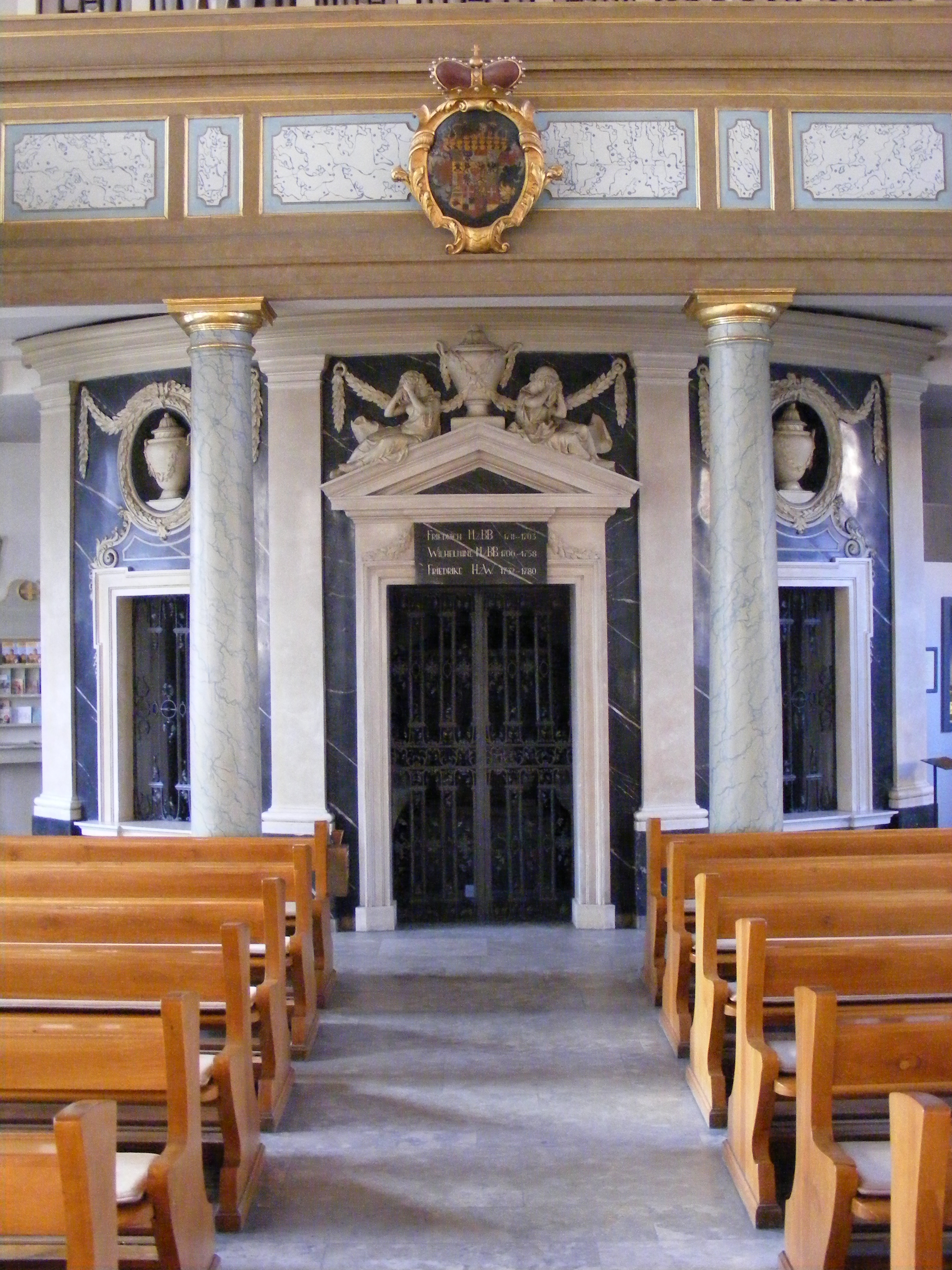 Bayreuth, Schlosskirche, Fürstengruft der Bayreuther Markgrafen (Markgräfin Wilhelmine, ihr Gatte Friedrich III. von Brandenburg-Bayreuth und die Tochter Elisabeth Friederike Sophie von Brandenburg-Bayreuth) (Gesamtansicht)